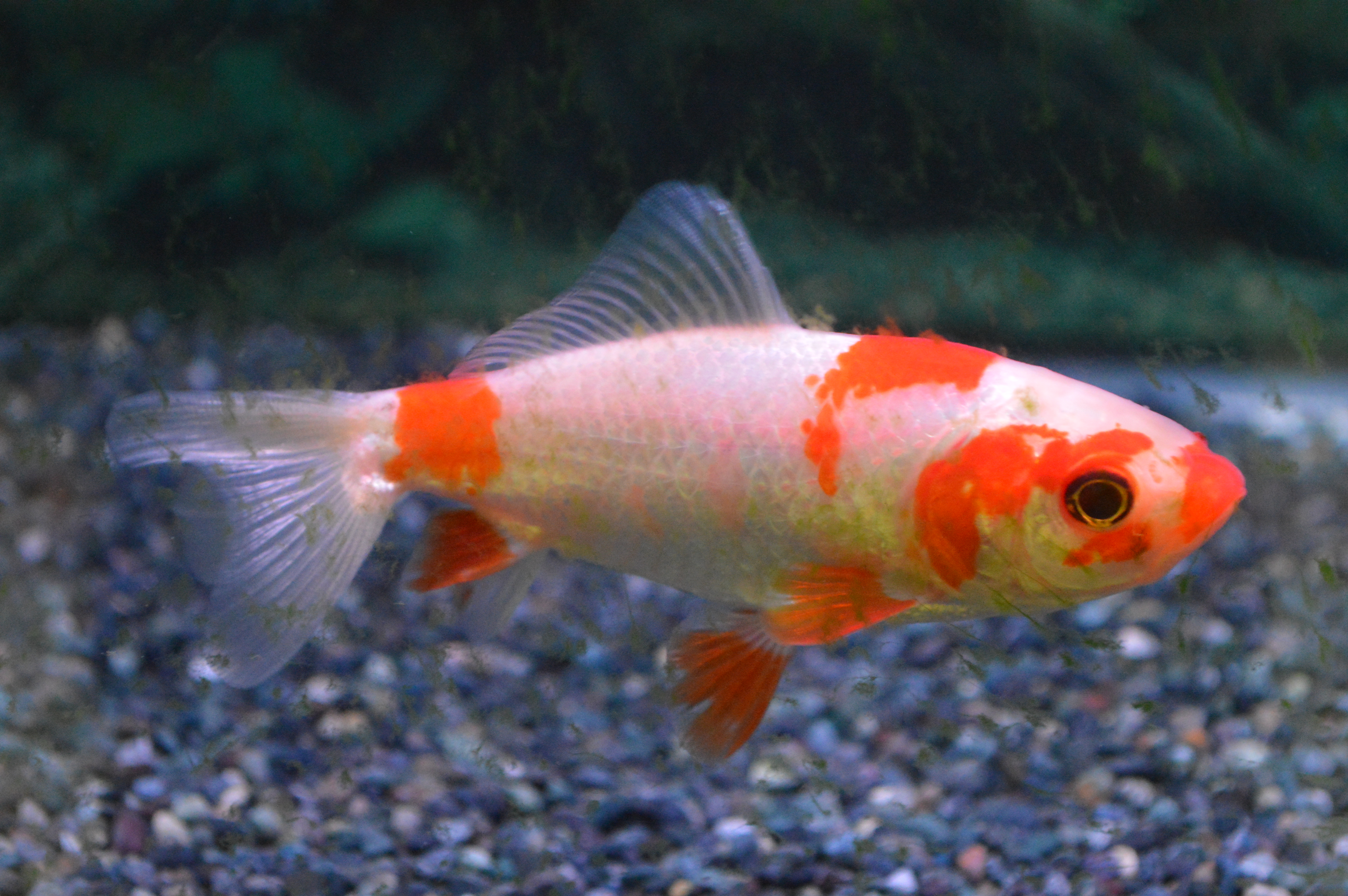 弥富金魚。ワキン（和金）。